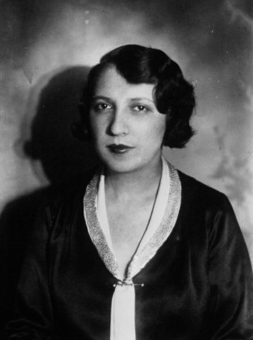 Madeleine, la femme de Charles Pélissier.